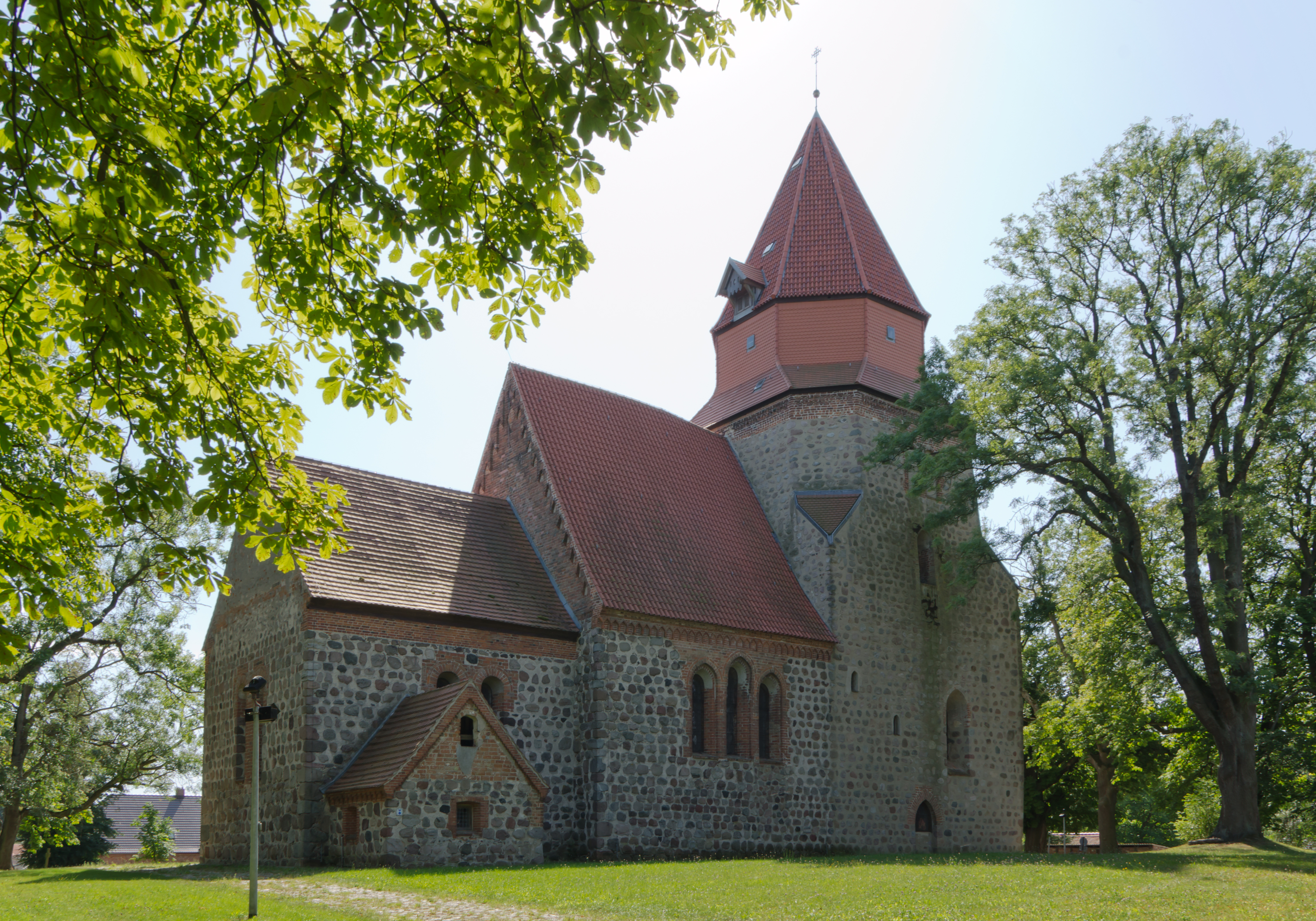 Kavelstorf - Kirche